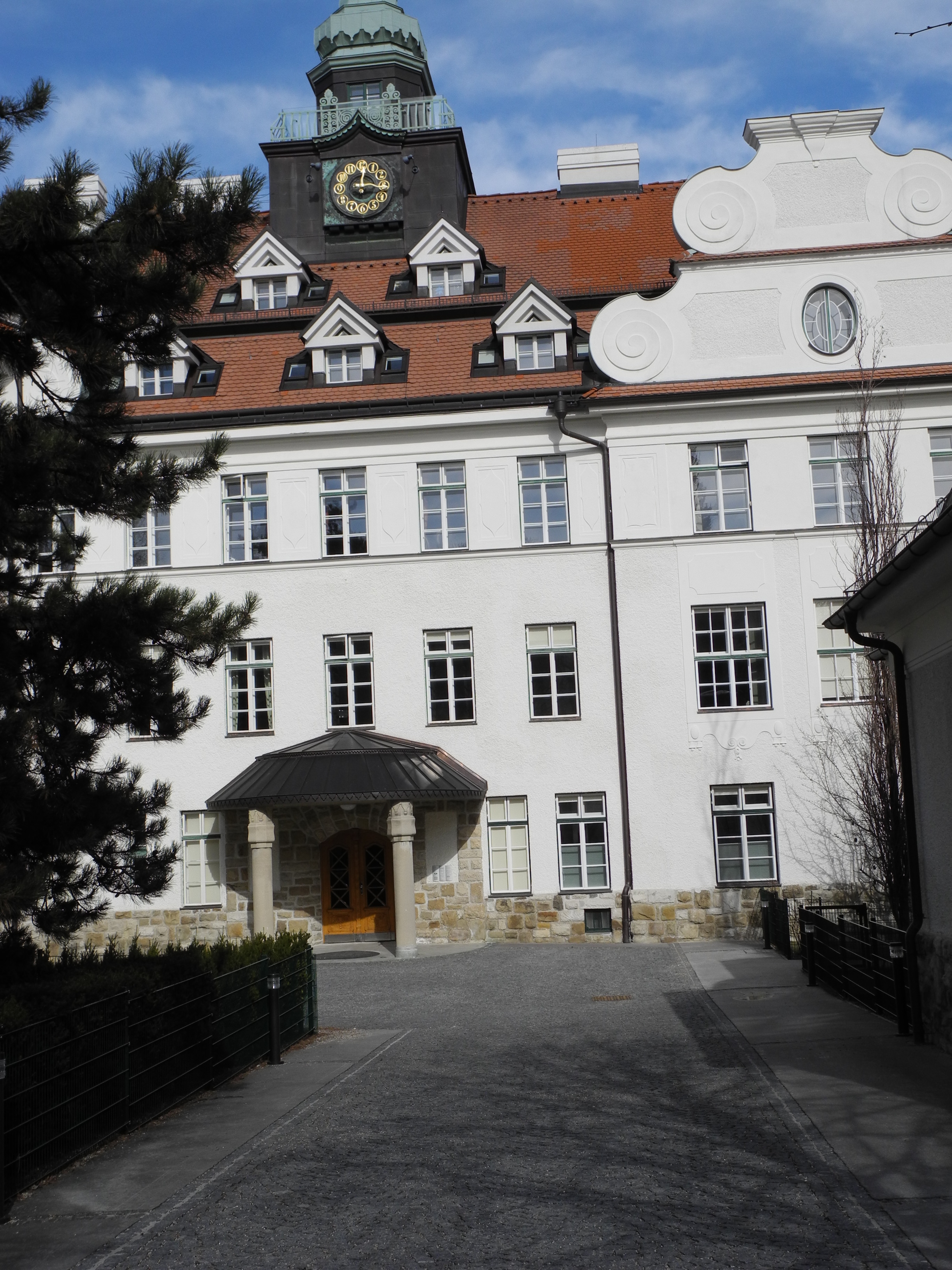 Ehem. Kinderklinik Glanzing